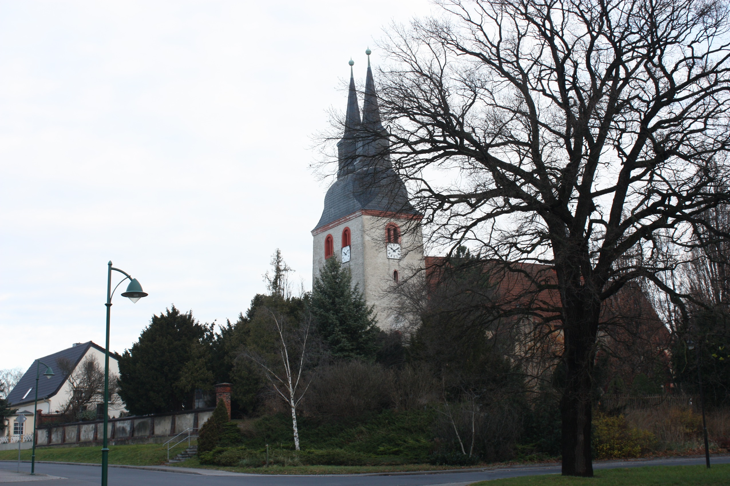 Die Dorfkirche St.Laurentius